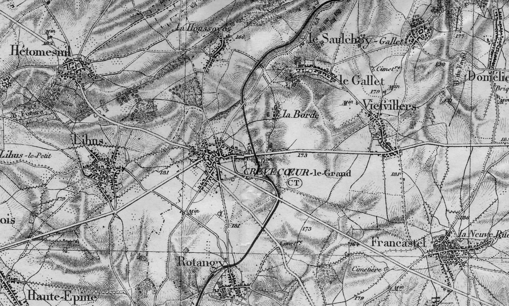 Carte d'état-Major, feuille de Montdidier (Oise), 1/80.000e, révision de 1885, numérisation à 300dpi